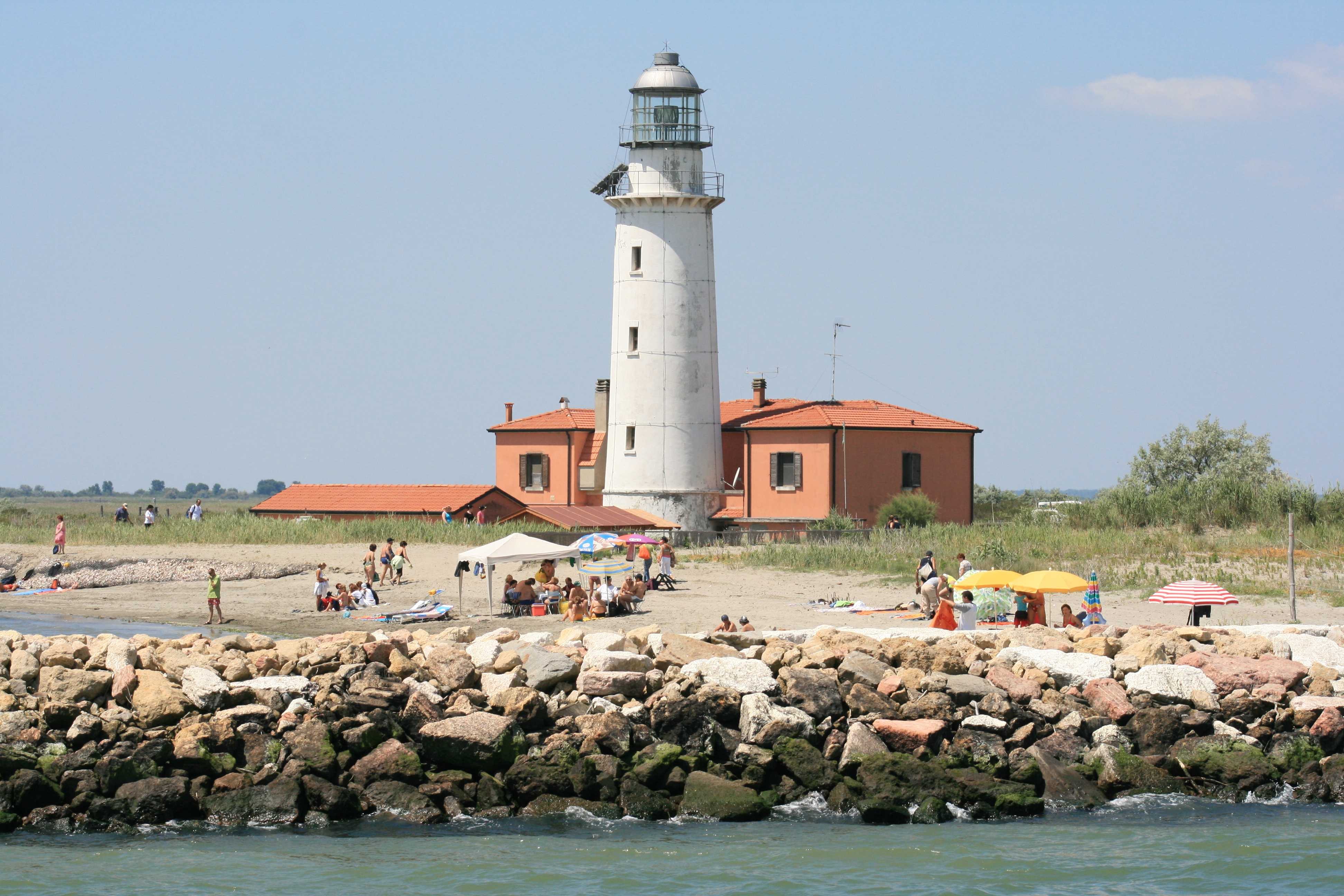 Faro di Goro